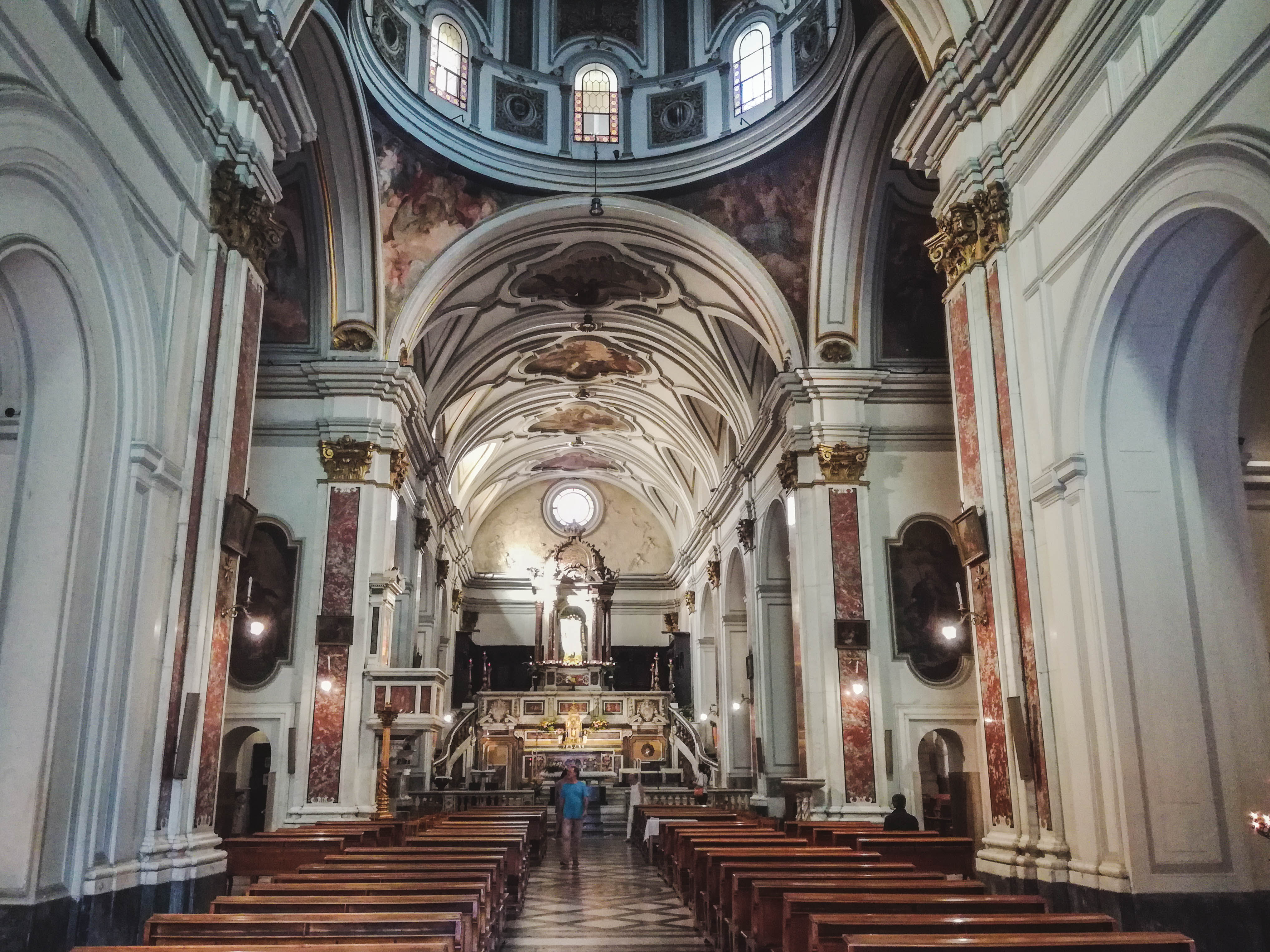 Navata di Santa Maria di Piedigrotta (Napoli)